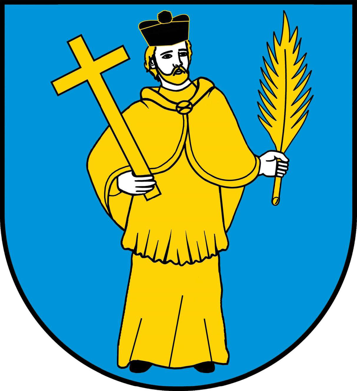 Herb gminy Szulborze Wielkie